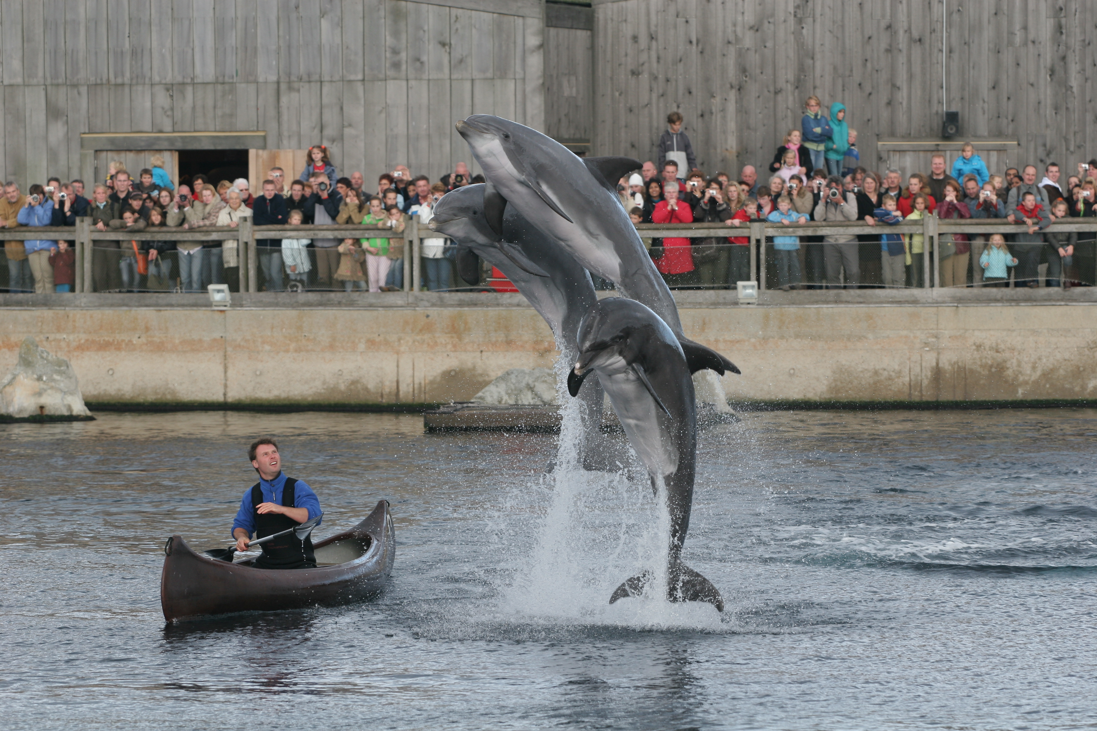 Dolfijnen in het Dolfinarium Harderwijk